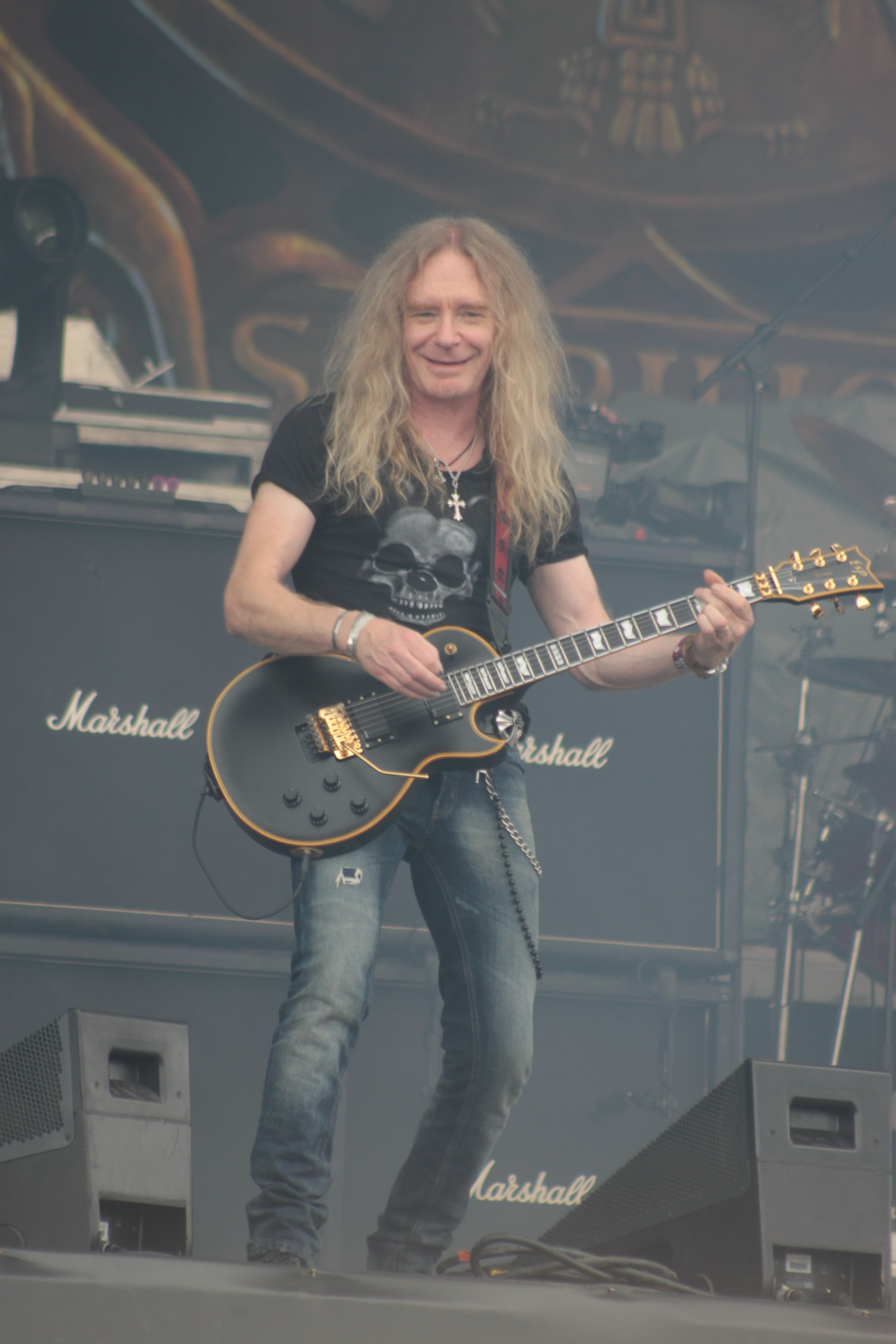 Saxon, Hellfest 2013, Fr-44-Clisson.